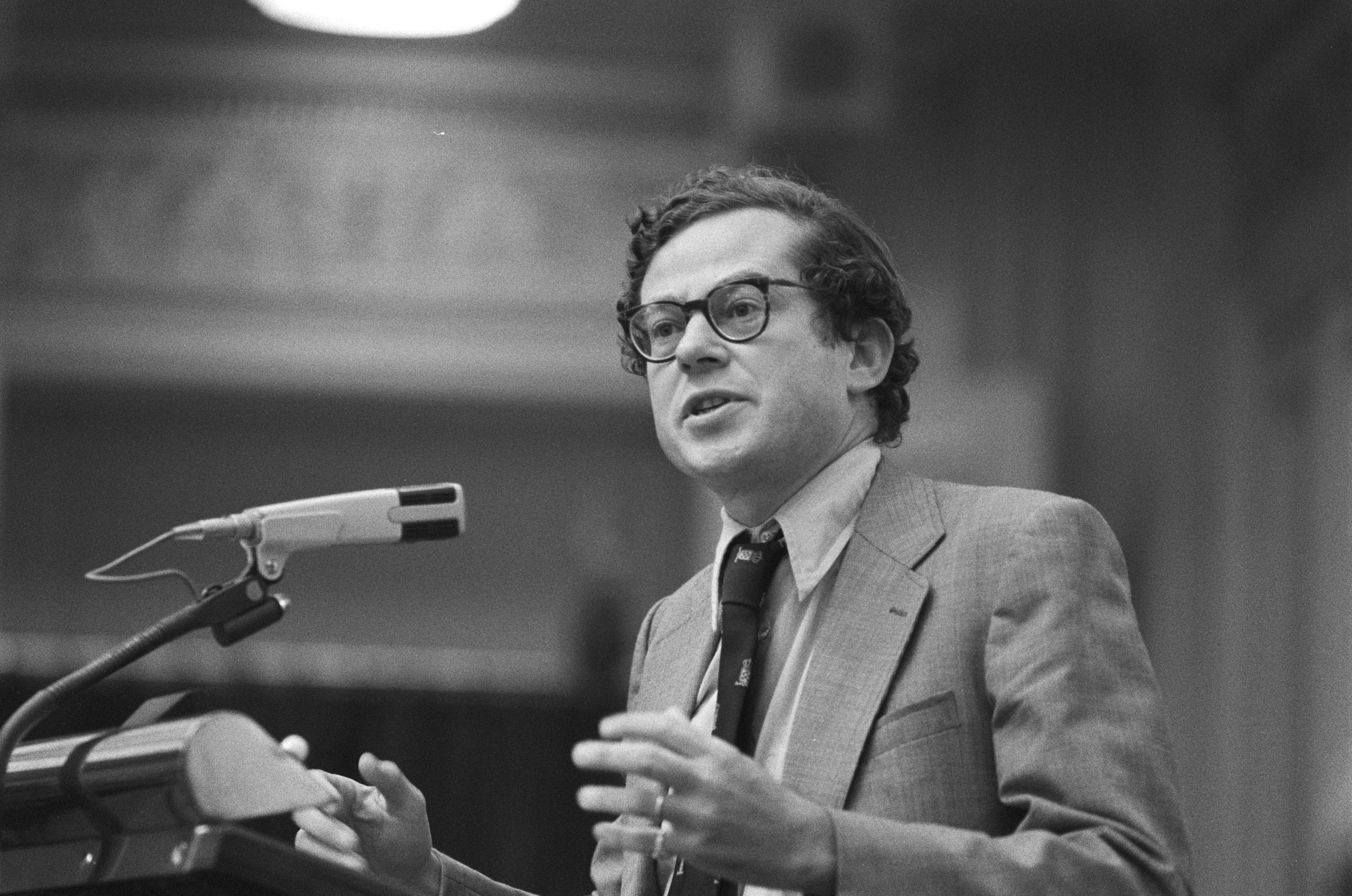 Collectie / Archief : Fotocollectie Anefo Reportage / Serie : Tweede Kamer debat over de deelname van een Zuid-Afrikaans team aan de Olympische Spelen voor Gehandicapten in 1980 in Nederland te houden Beschrijving : Hans Gualthérie van Weezel (CDA) Datum : 29 augustus 1979 Locatie : Den Haag, Zuid-Holland Trefwoorden : parlementaire debatten, parlementariërs, politiek, portretten Persoonsnaam : Gualthérie van Weezel, Hans Instellingsnaam : CDA, Tweede Kamer Fotograaf : Suyk, Koen / Anefo Auteursrechthebbende : Nationaal Archief Materiaalsoort : Negatief (zwart/wit) Nummer archiefinventaris : bekijk toegang 2.24.01.05 Bestanddeelnummer : 930-4151